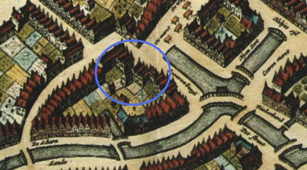 Uitsnede van de Leeuwenburg